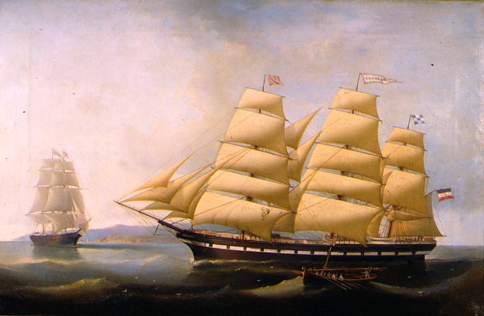 Das Vollschiff EUROPA wurde 1854 für 46.250 Taler bei Johann Lange in Vegesack für die Reederei D.H.Wätjen & Co erbaut. Der Stapellauf war am 25.April 1854, die Länge im Kiel betrug 44,6 m, die Breite 10,2 m, es war vermessen mit 374 Commerzlasten (864 NRT). In den ersten 3 Jahren segelte das Vollschiff unter Kapitän W.J. Ariaans mit etwa 400 Passagieren nach Amerika und mit Tabak und Baumwolle nach Europa zurück. Ein Kohletransport führte die EUROPA 1857 von Cardiff nach Bombay, wo sie von verschiedenen Firmen gechartert mit Fahrten zwischen Calcutta, Bassein, Singapur, Hongkong, Macao, Kanton und Shanghai festgehalten wurde, bis sie im Februar 1860 mit 500 chinesischen Passagieren in Sydney anlegte. 1861 nahm sie unter Kapitän B.v. Hagen die Tabak- und Baumwollfahrt wieder auf, die jedoch 1862/63 und 66- immer für 8-10 Monate - unterbrochen wurde, da die EUROPA von New York aus für Transporte nach Callao von Gildemeisters gechartert wurde. Auf dem Rückweg brachte sie Guano für Liverpool und zwei Ladungen Salpeter für New York. Auf ihrer dritten Fahrt zum Kap Horn brach an Bord Typhus aus. Sechs Mann wurden in das Hospital von Rio eingeliefert, und erst nach vierwöchiger Quarantäne konnte die Reise fortgesetzt werden. Mit Maryland-Tabak kam die Europa nach langer Abwesenheit im August 1867 nach Bremen. Hier wurde sie für 20.000 Taler an die Bremer Reederei Joh. Friedr. Arens verkauft, die den Segler bis 1884 bereederten und weiter an J. Ingmansson, Elleholm (Schweden) verkauften. 1890 ging der Segler verloren. Die auf dem Gemälde von C. Fedeler dargestellte Bremer Bark UNION trägt wie die EUROPA die Arens´sche Reedereiflagge im Top. Der Segler UNION, gebaut 1863 bei Toby & Littlefield in Portsmouth, N.H. (USA), vermessen mit 1183 BRT, ex SEMIRAMIS gehörte ebenfalls der Reederei Joh. Friedr. Arens unter der Führung von Kapitän Fokken. Später diente der Segler der Deutschen Dampffischereigesellschaft Nordsee in Nordenham als Eistransportschiff.